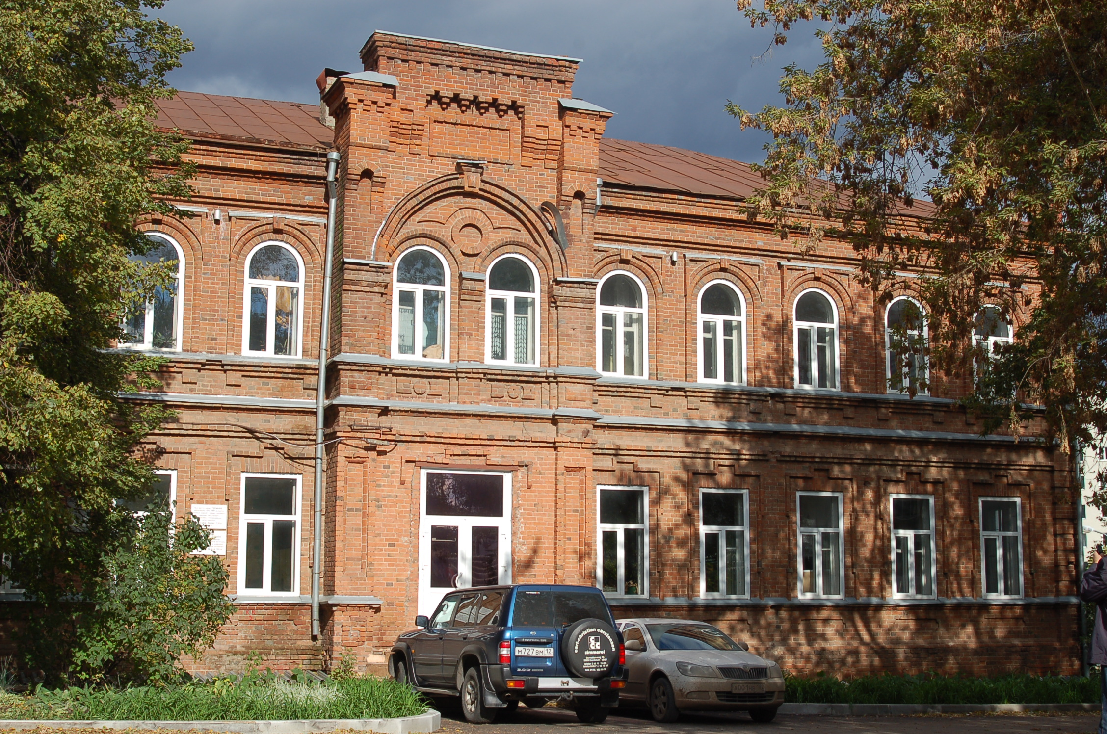 Здание усманского медресе (Республика Башкортостан, Уфа, тукаева улица, 39)